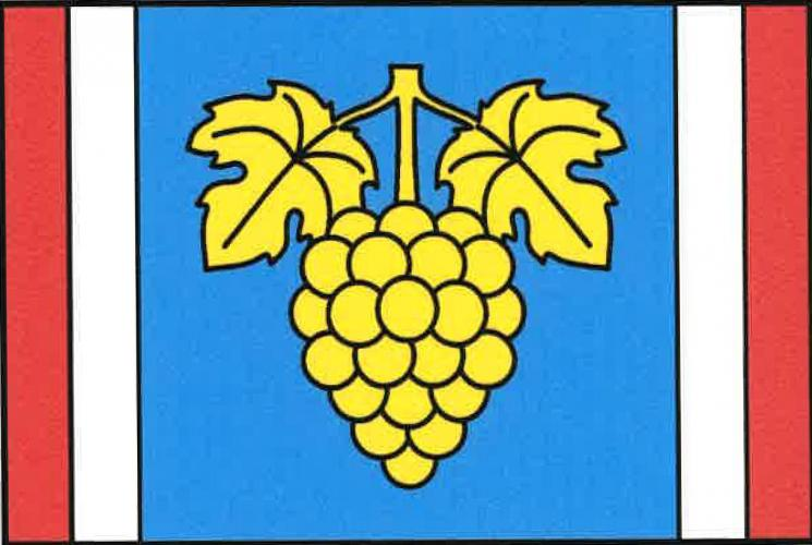 Hroznatín vlajka